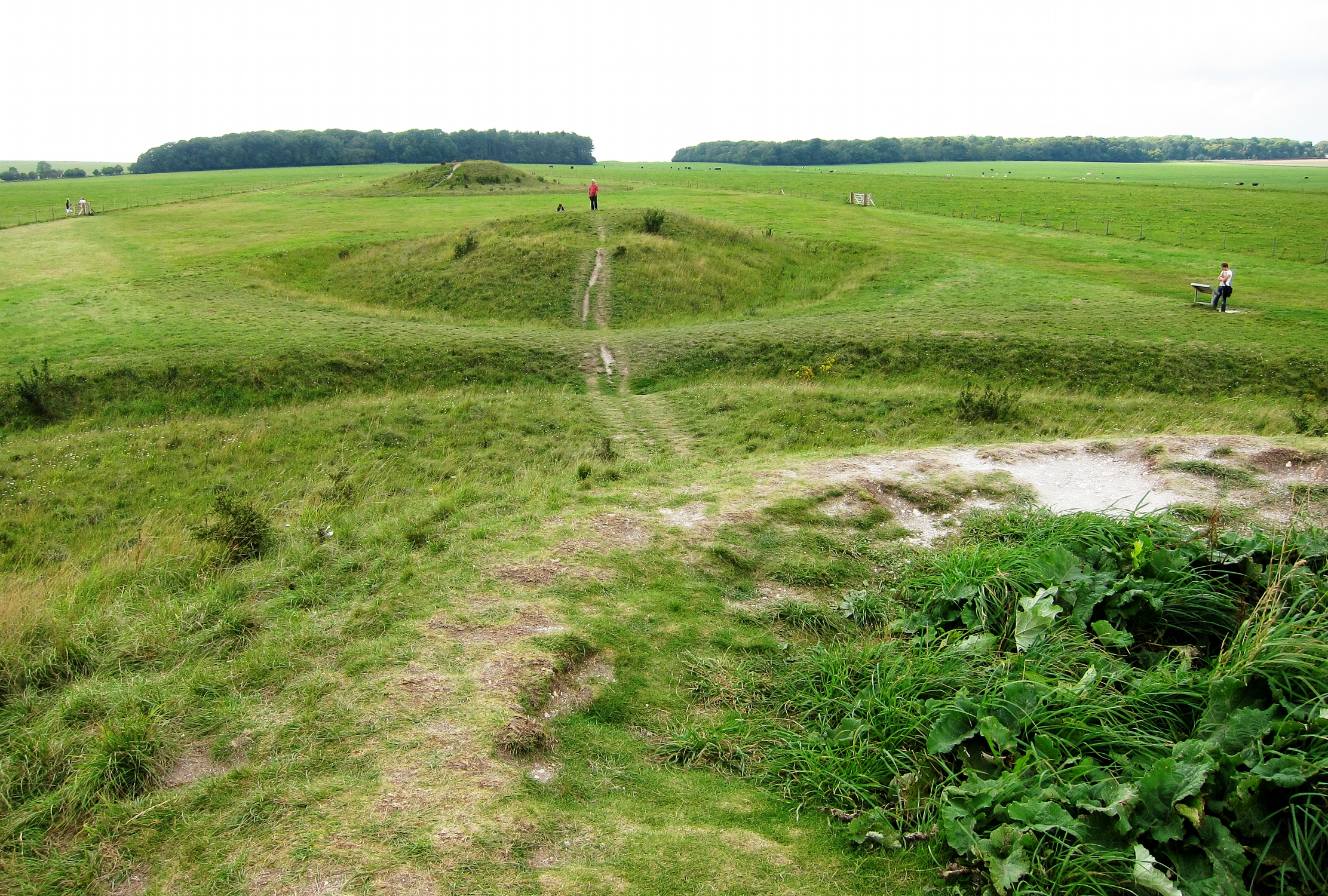 Tumulus à Stonehenge (Wiltshire).